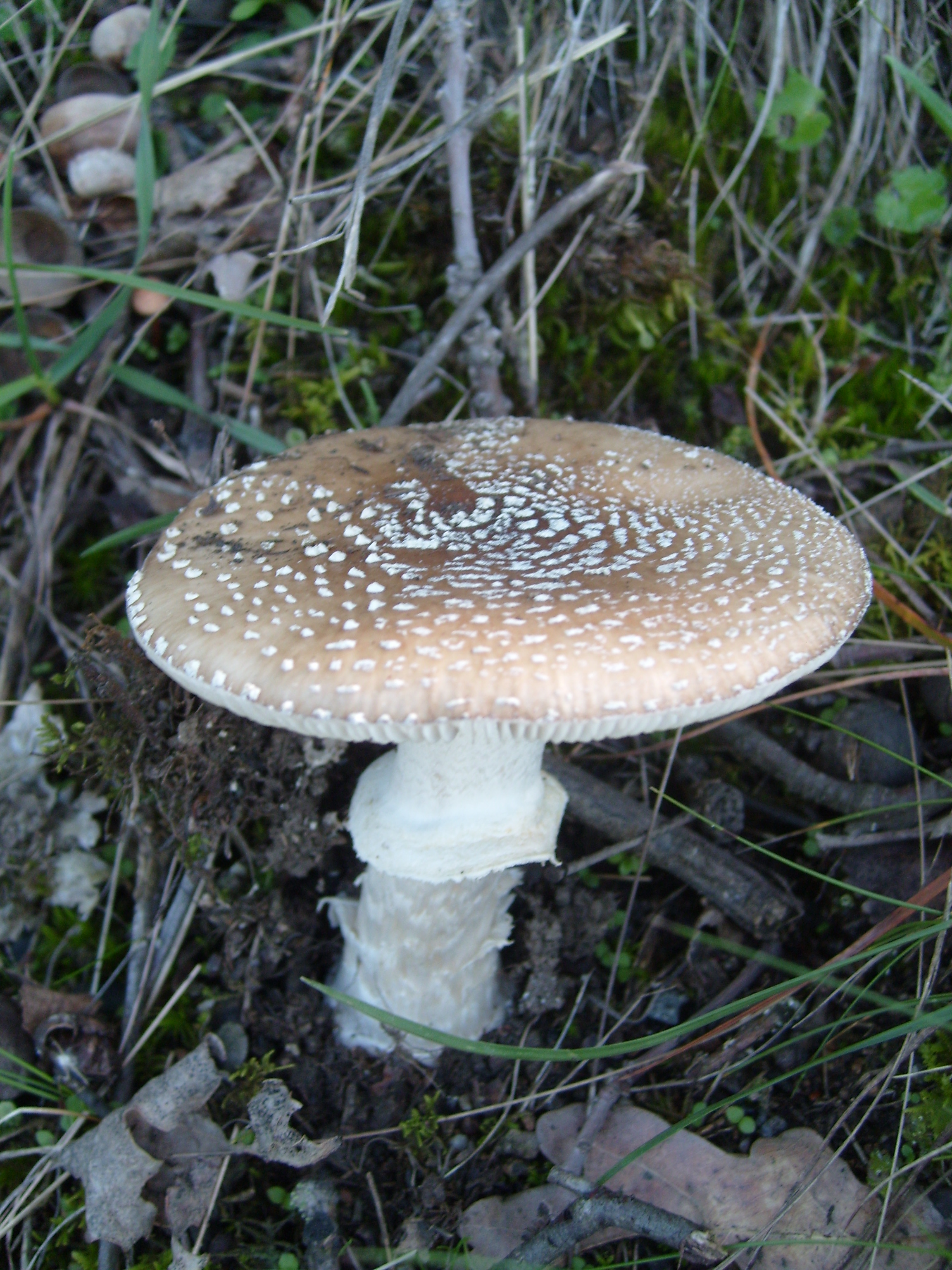 Muchomůrka tygrovaná (Amanita pantherina)